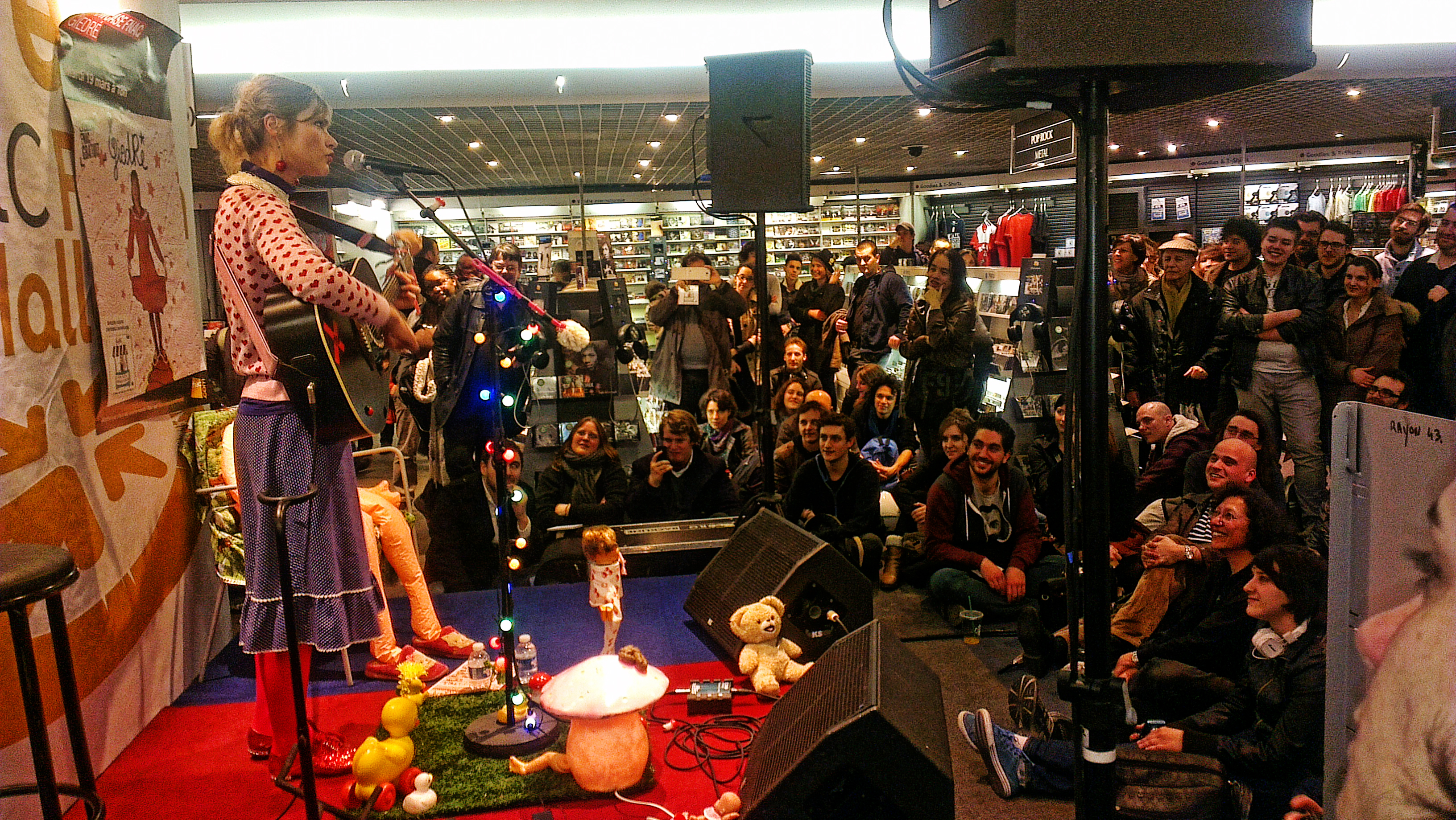 La chanteuse GiedRé présente son premier album, le 19 mars 2013 à Paris.